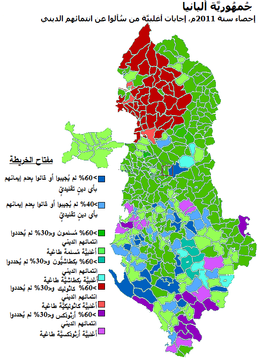 توزُّع الطوائف والفرق الدينيَّة المُختلفة في ألبانيا، بما فيها المُسلمون والبكطاشيُّون والكاثوليك والأرثوذكس.